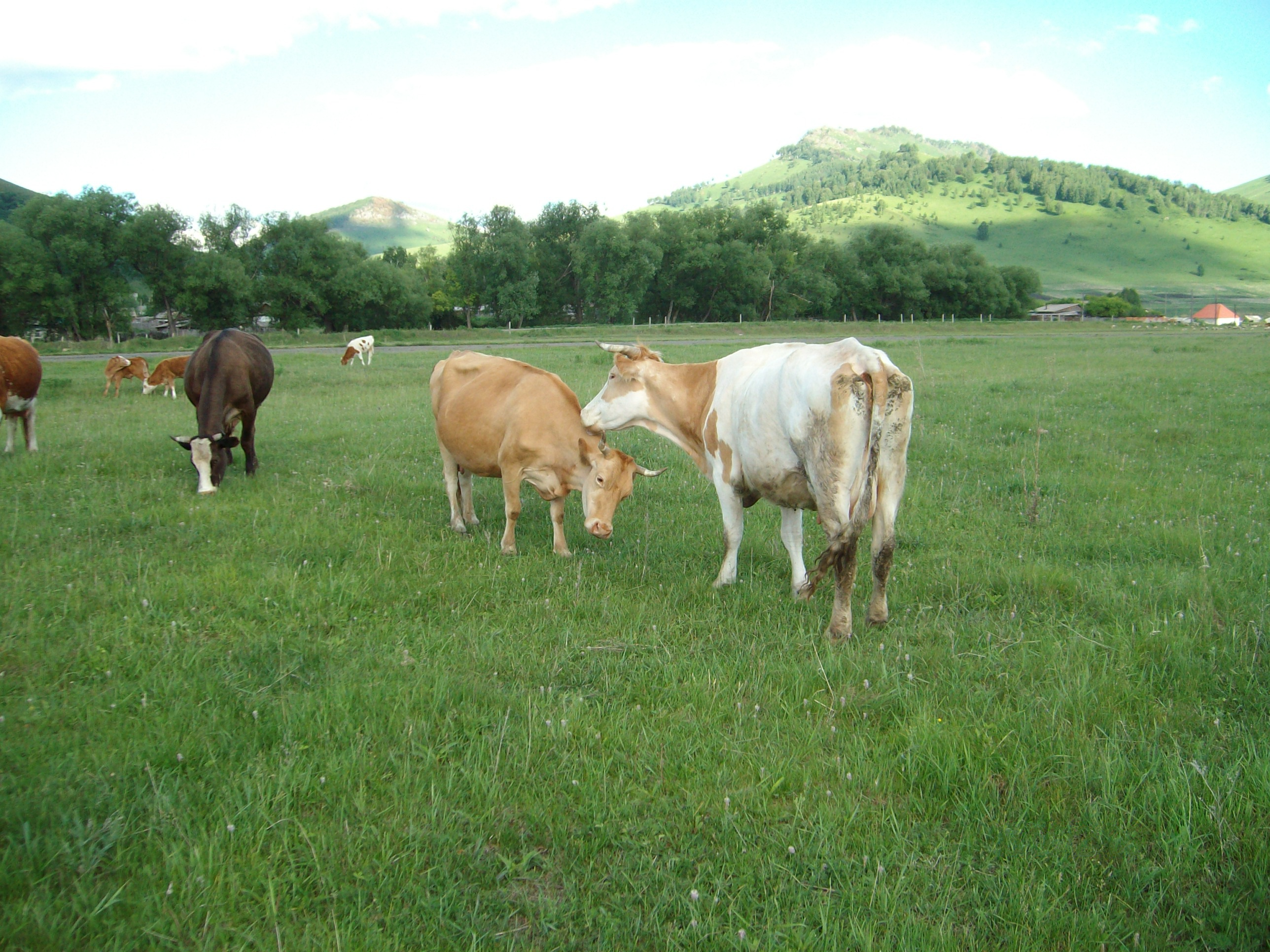 Мясомолочное животноводство-основная отрасль экономики Солонешенского района